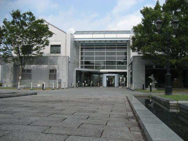 日本城郭研究センター（兵庫県姫路市）